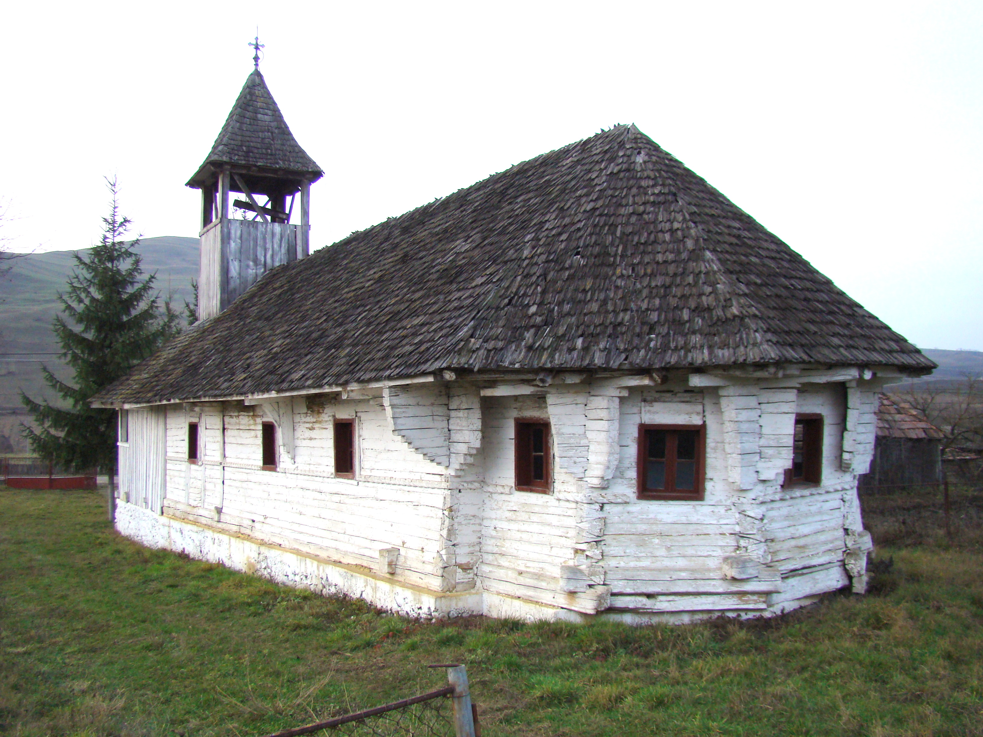 Biserica de lemn „Sf.Arhangheli” din Mădărășeni, județul Mureș